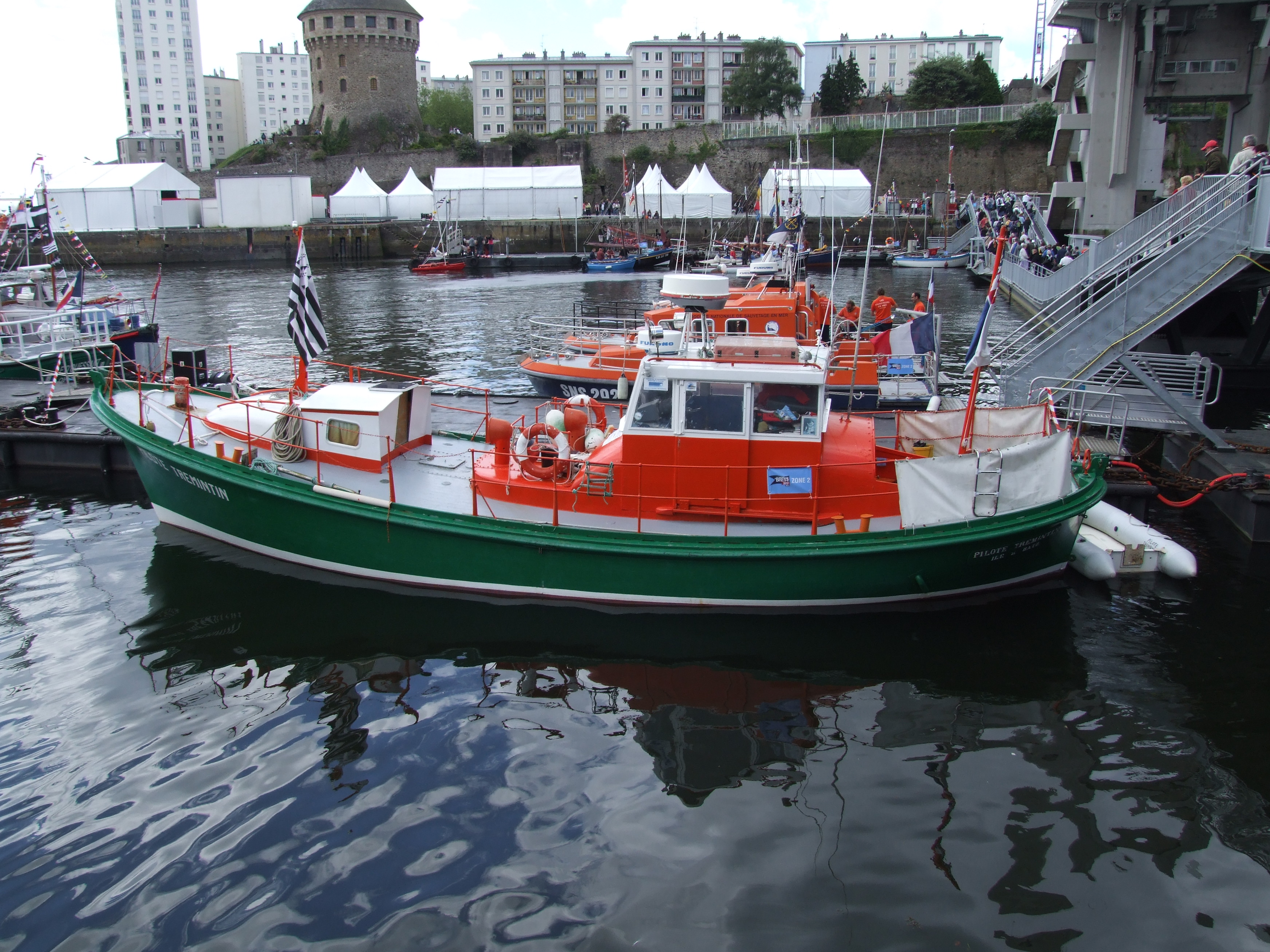 Tonnerres de Brest 2012 : L'ancien canot de sauvetage SNSM de l'île de Batz : Le "Pilote Trémintin"